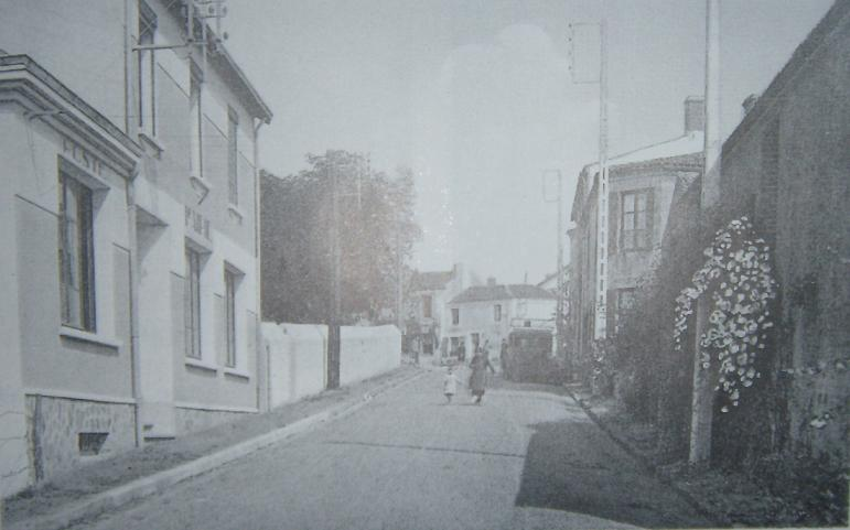 Mairie de Saint-Germain-sur-Moine en 1934